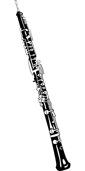 instrument muzyczny